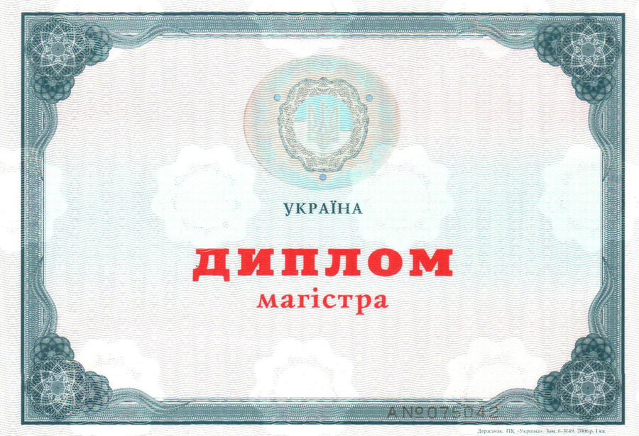 Диплом магістра України